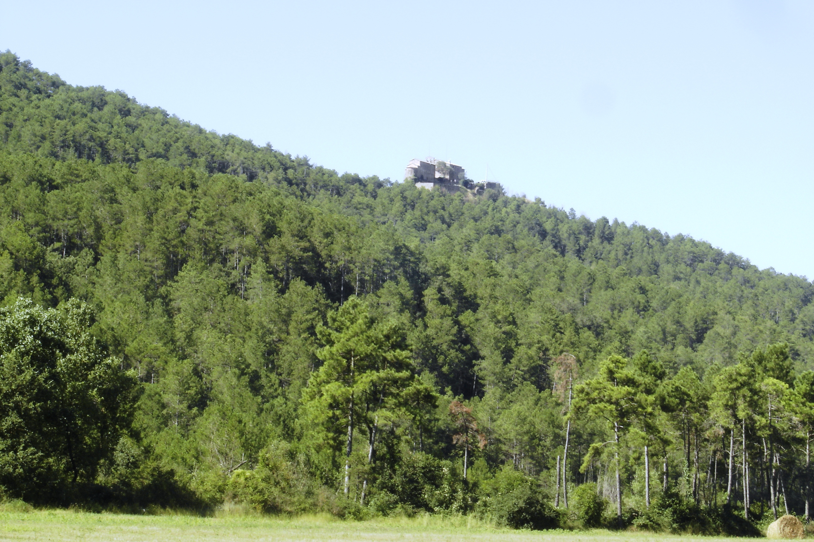 El nucli de Ceuró vist des del dons de la vall de la Ribera Salada